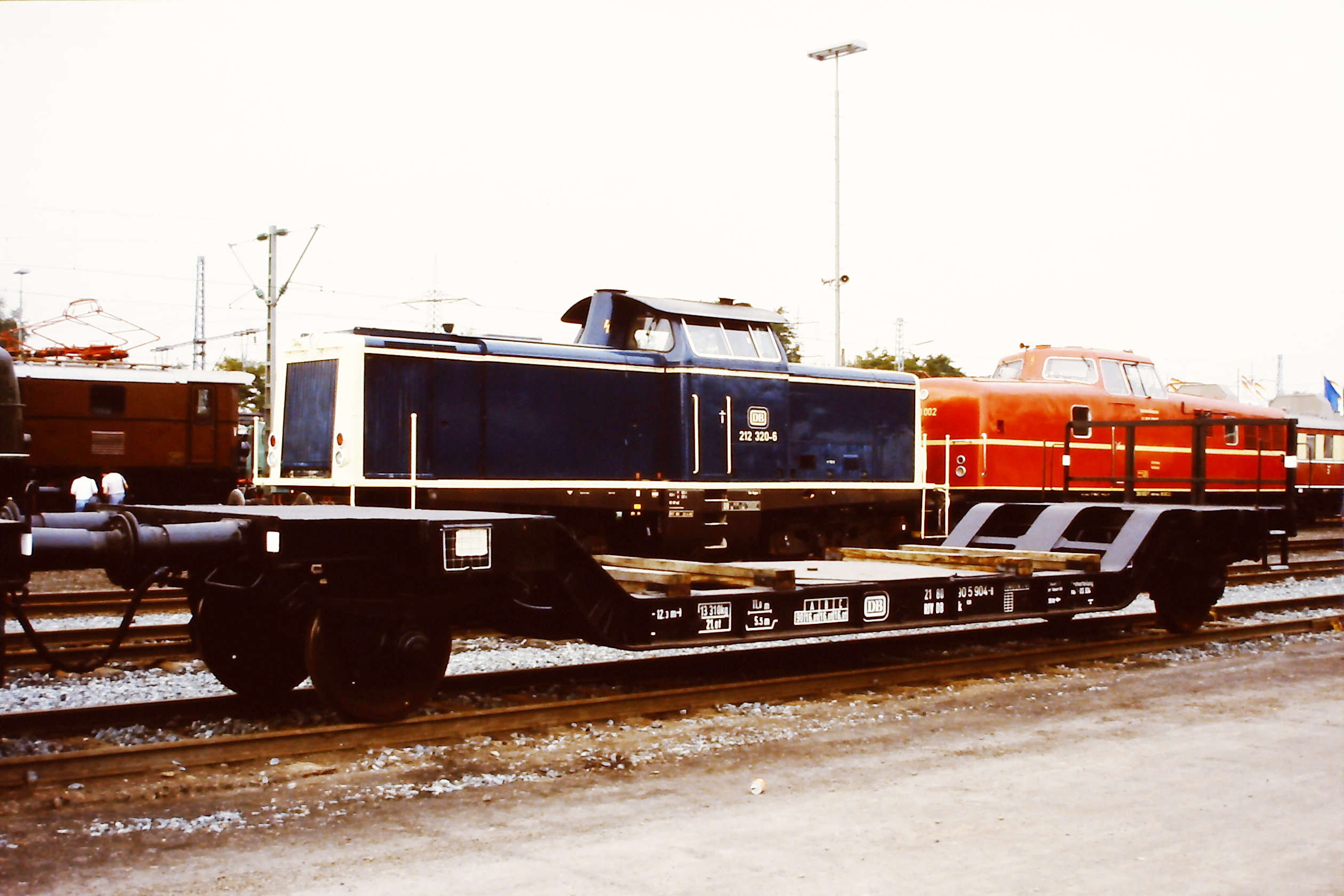 Uik 630 (21 80 990 5 904-8), ausgestellt in der Fahrzeugschau "150 Jahre deutsche Eisenbahn in Bochum-Dahlhausen